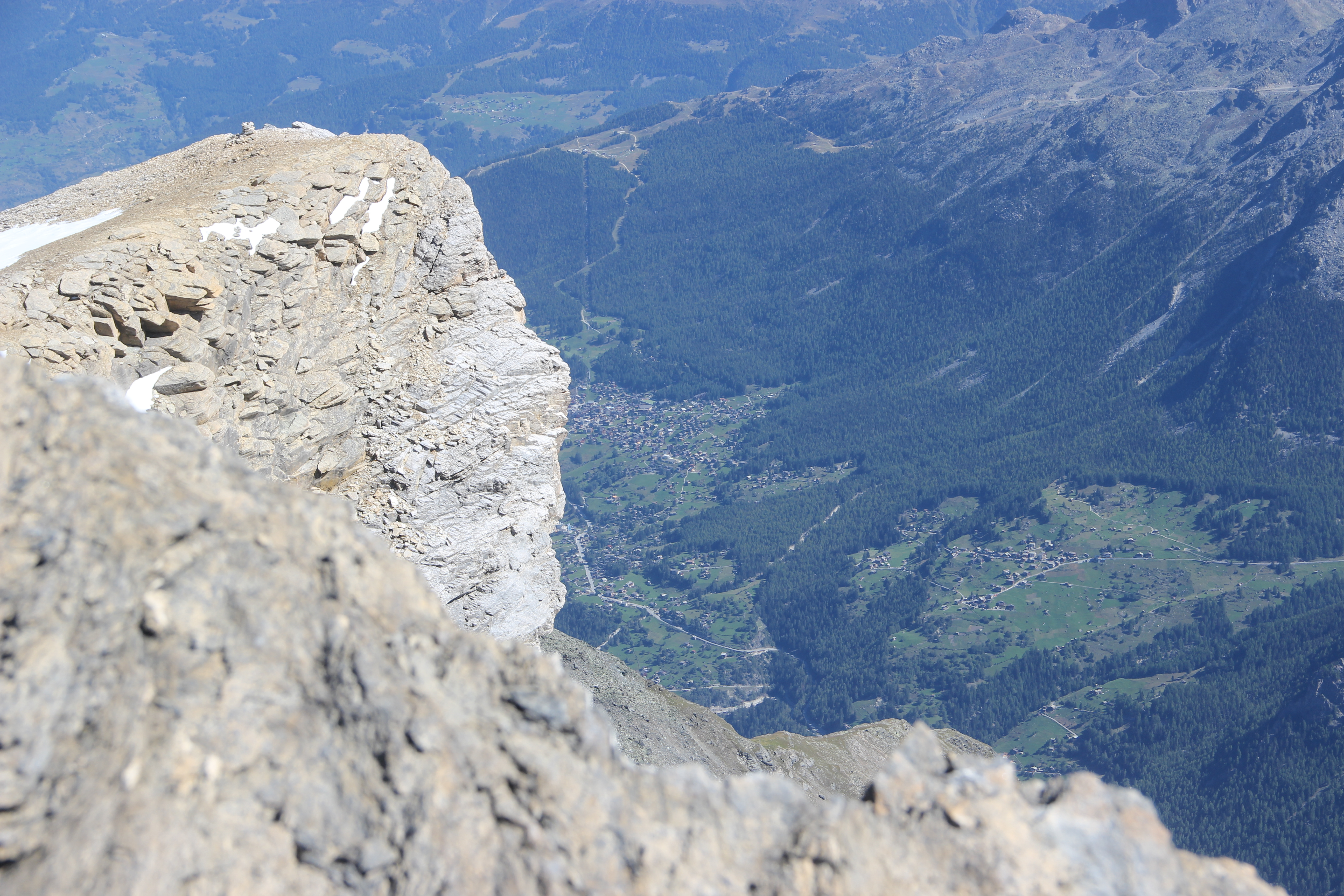 Grächen